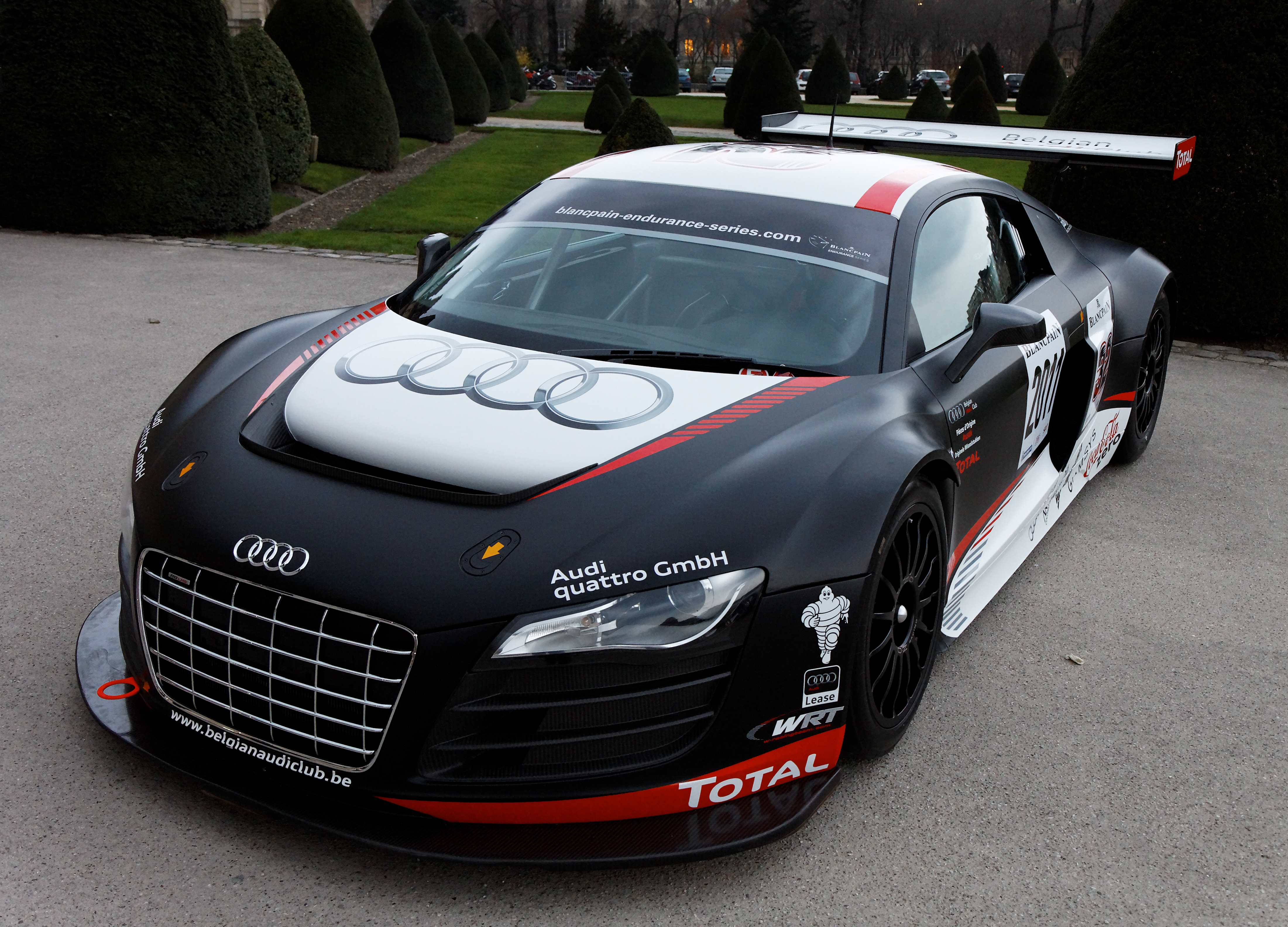 Photographie prise lors de la présentation du Blancpain Endurance series aux Invalides à Paris en mars 2011.